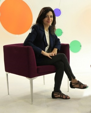 Marina Izaura Jeha Person (São Paulo, 15 de fevereiro de 1969), é uma atriz, cineasta e apresentadora brasileira.